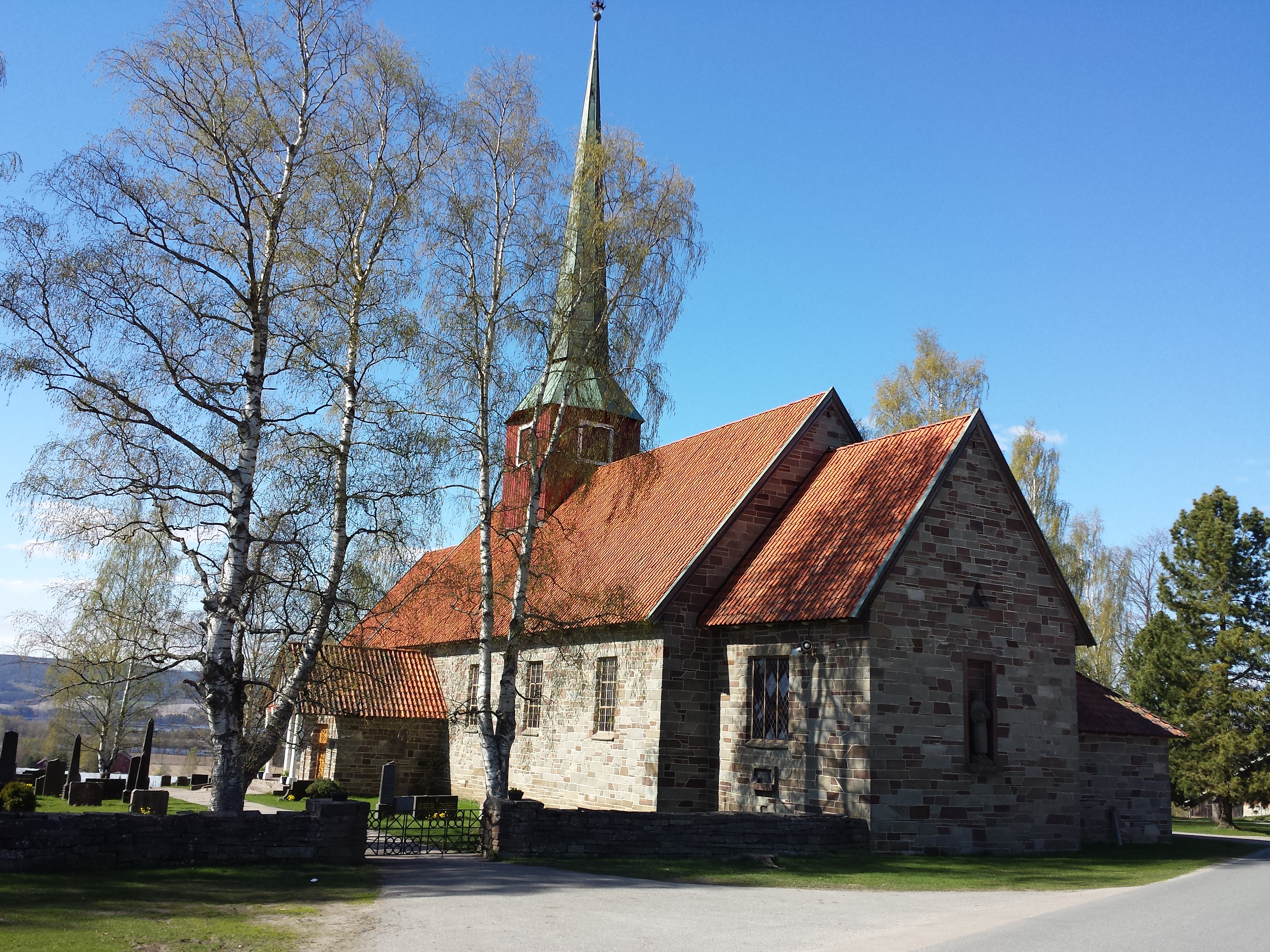 Fotoet viser øst og sørfasaden